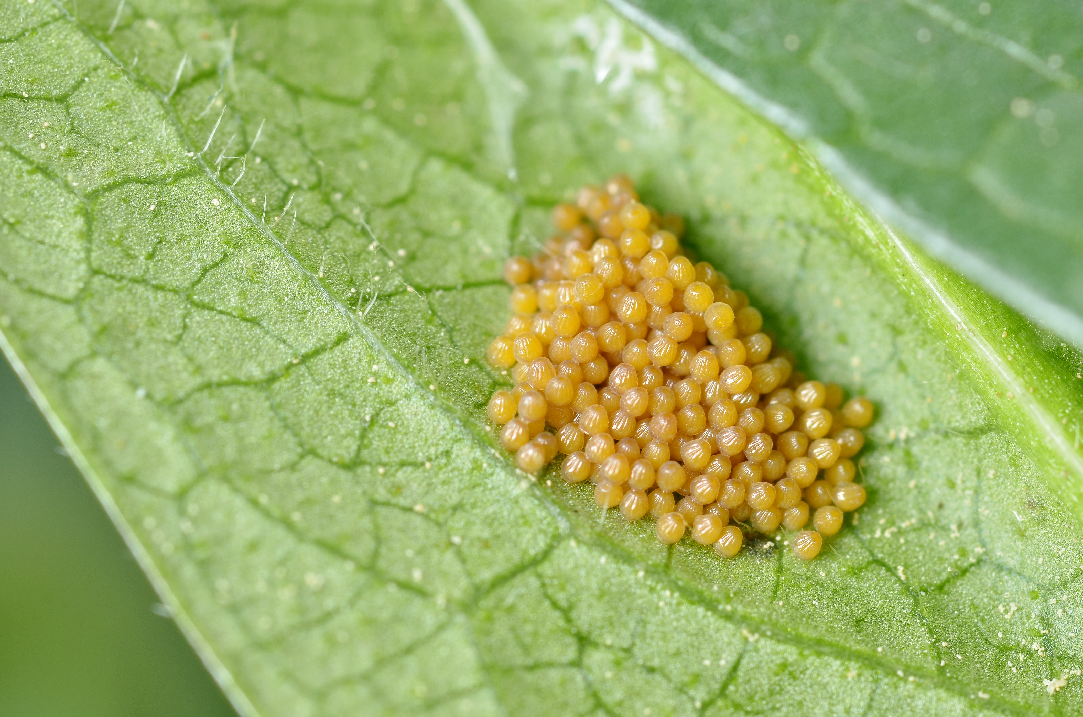 Eupydryas aurinia eggs